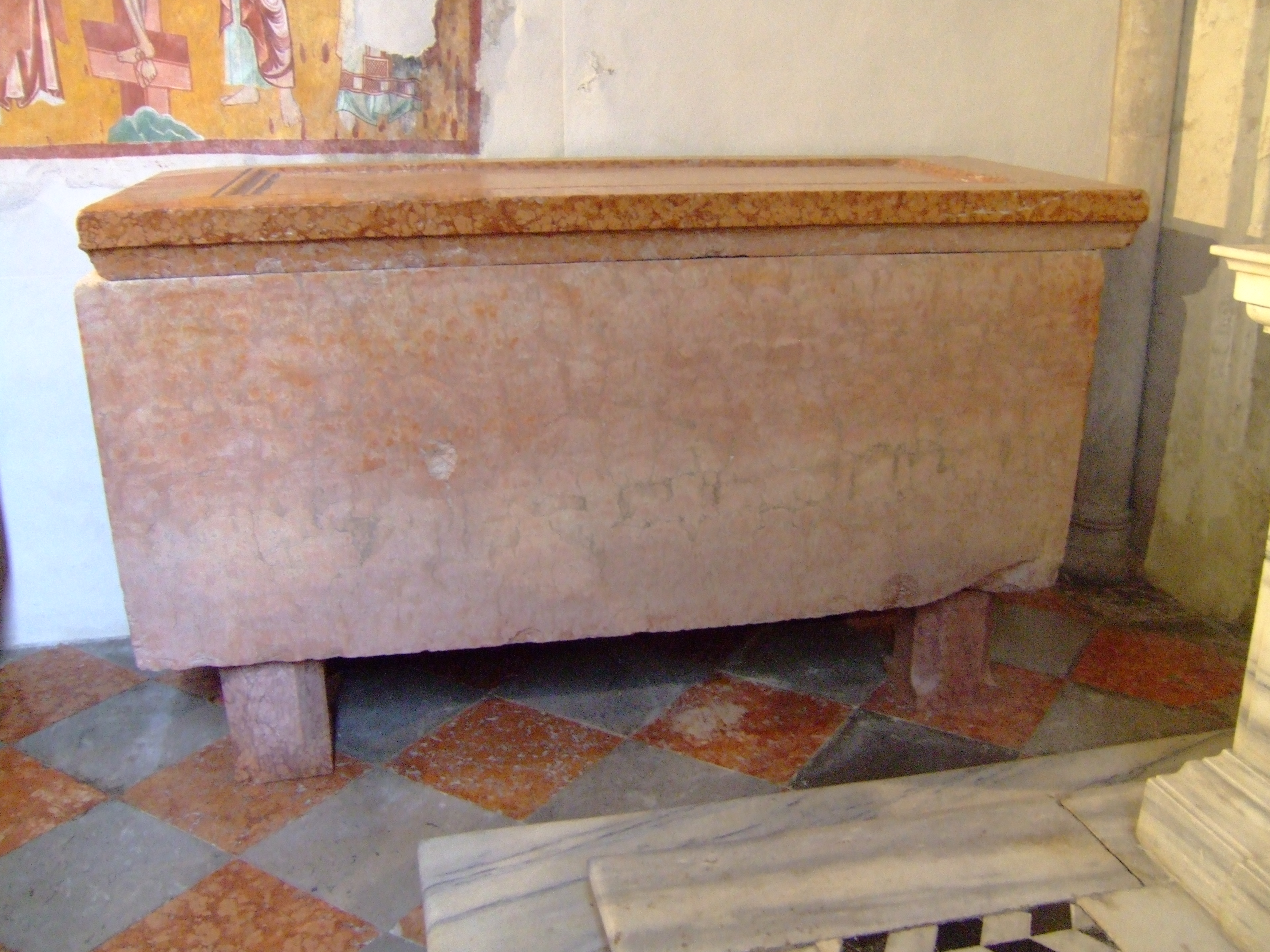 Aquileia - Basilica Patriarcale - Cappella di sant'Ambrogio Tomba del patriarca Pagano della Torre